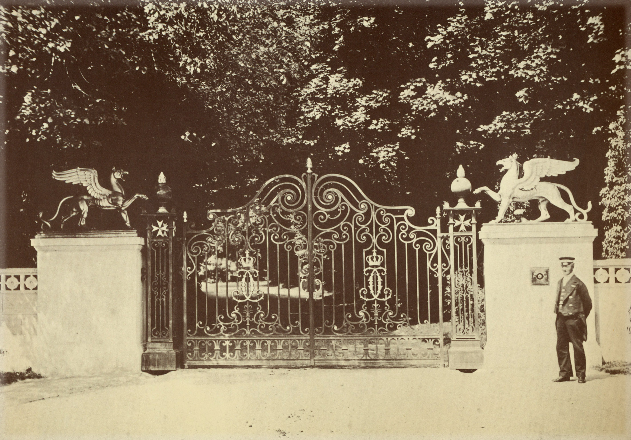 Klein-Glienicke, Das Johannitertor, Foto M. Pankow, 1872